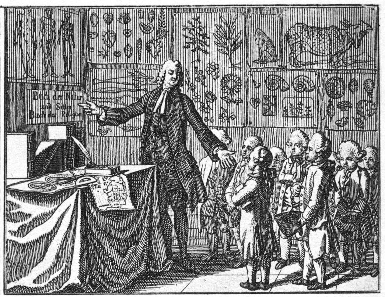 Tab. XLVIII. Wirkungen der Religion. b) Der Unterricht der Kinder um Gottes willen, teils durch das Buch der Natur und Sitten, teils durch das Buch der Religion. (Beschreibung lt. Quelle)